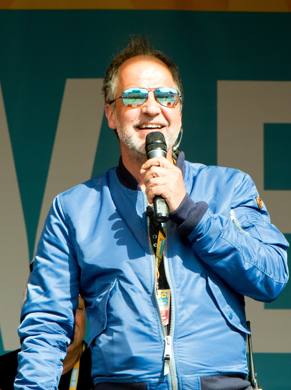 Marek Erhardt beim Lidl-Viewing zur Fußball-Europameisterschaft 2016 auf dem Heiligengeistfeld in Hamburg